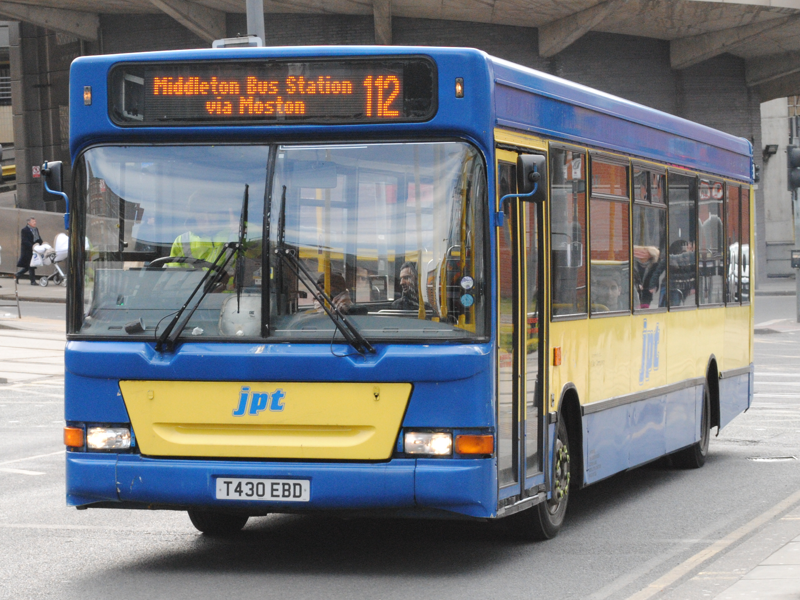 Dennis Dart SLF 10.7m Plaxton Pointer 2. ex Pete's Travel, West Bromwich